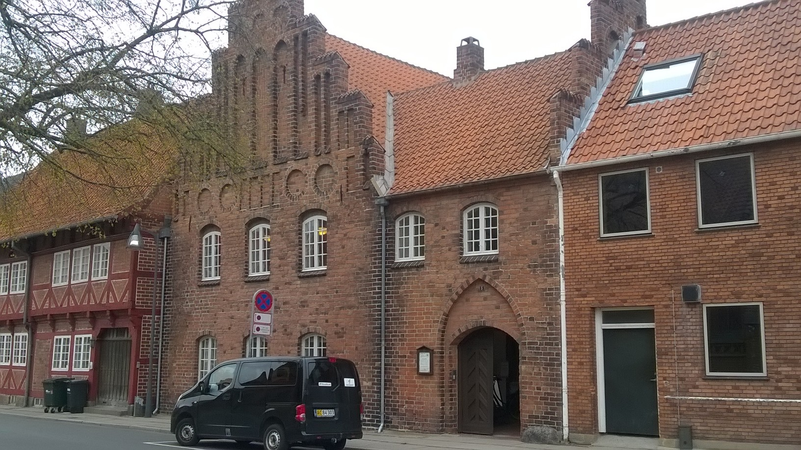 Byens ældste rådhus. Også Nordens ældste bevarede rådhus.